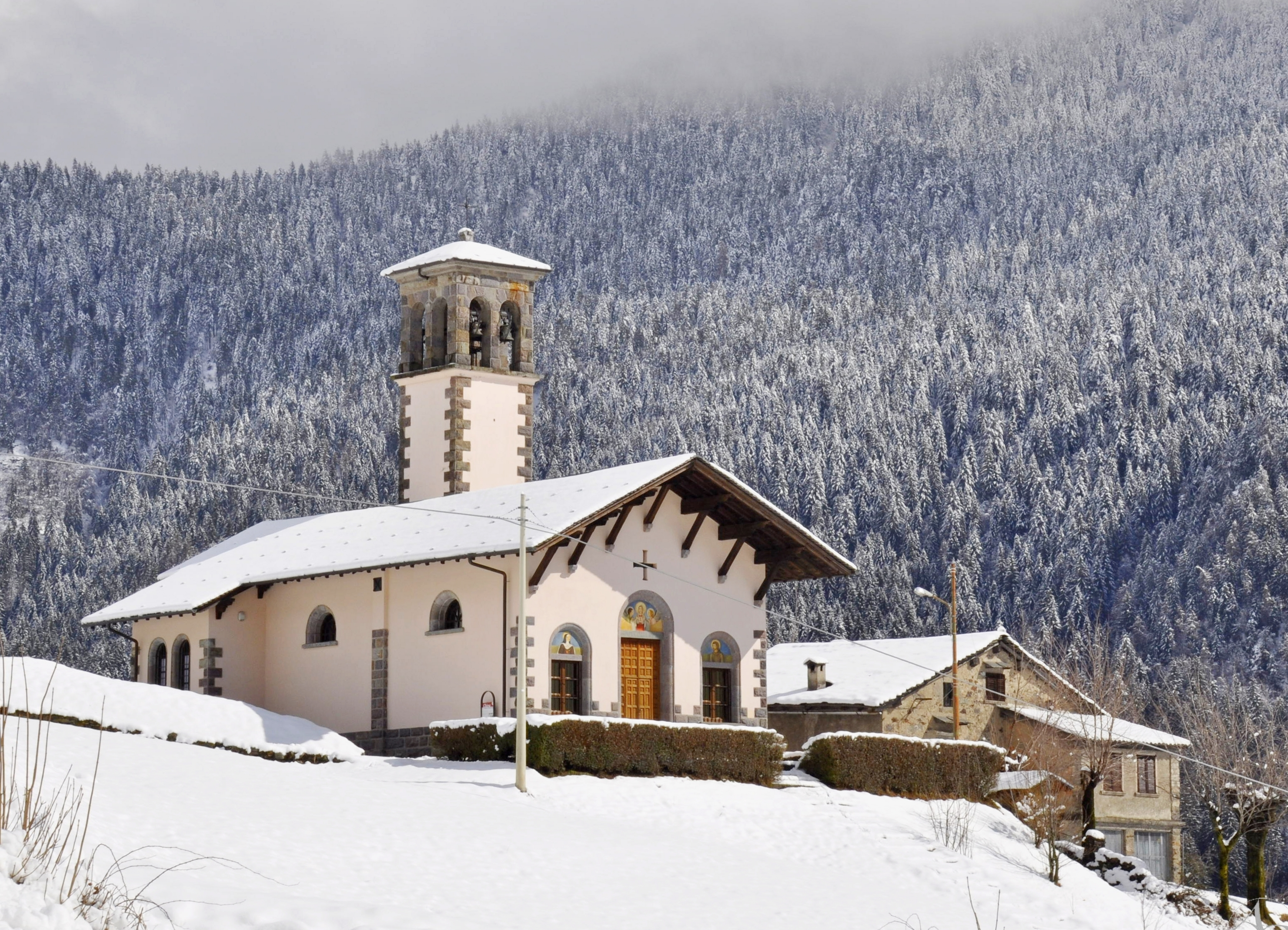 Chiesa della Visitazione nella frazione Ripa di Gromo